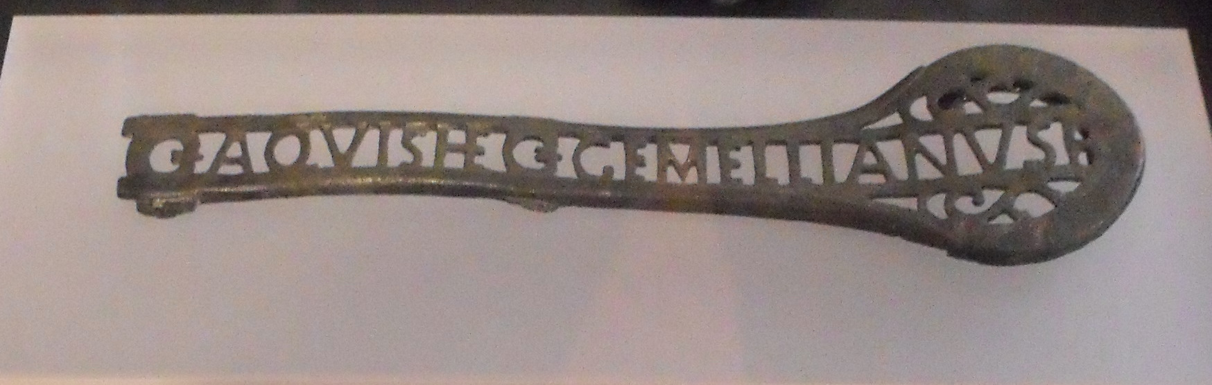 Garniture de fourreau de poignard, du IIe s. issus des fouilles de Mandeure-Mathay, Musée de Montbéliard Inscription : AQUIS HE(lveticis) GEMELLIANUS F(ecit)